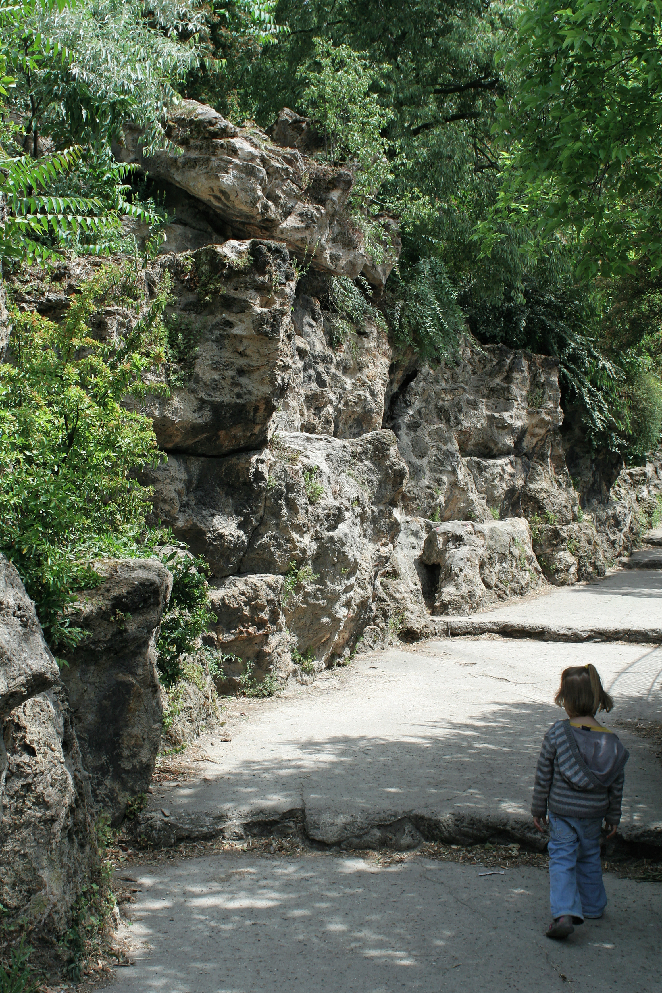 Paris, parc des Buttes-Chaumont. Allée à pas-d'âne sur l'île, faux rochers.